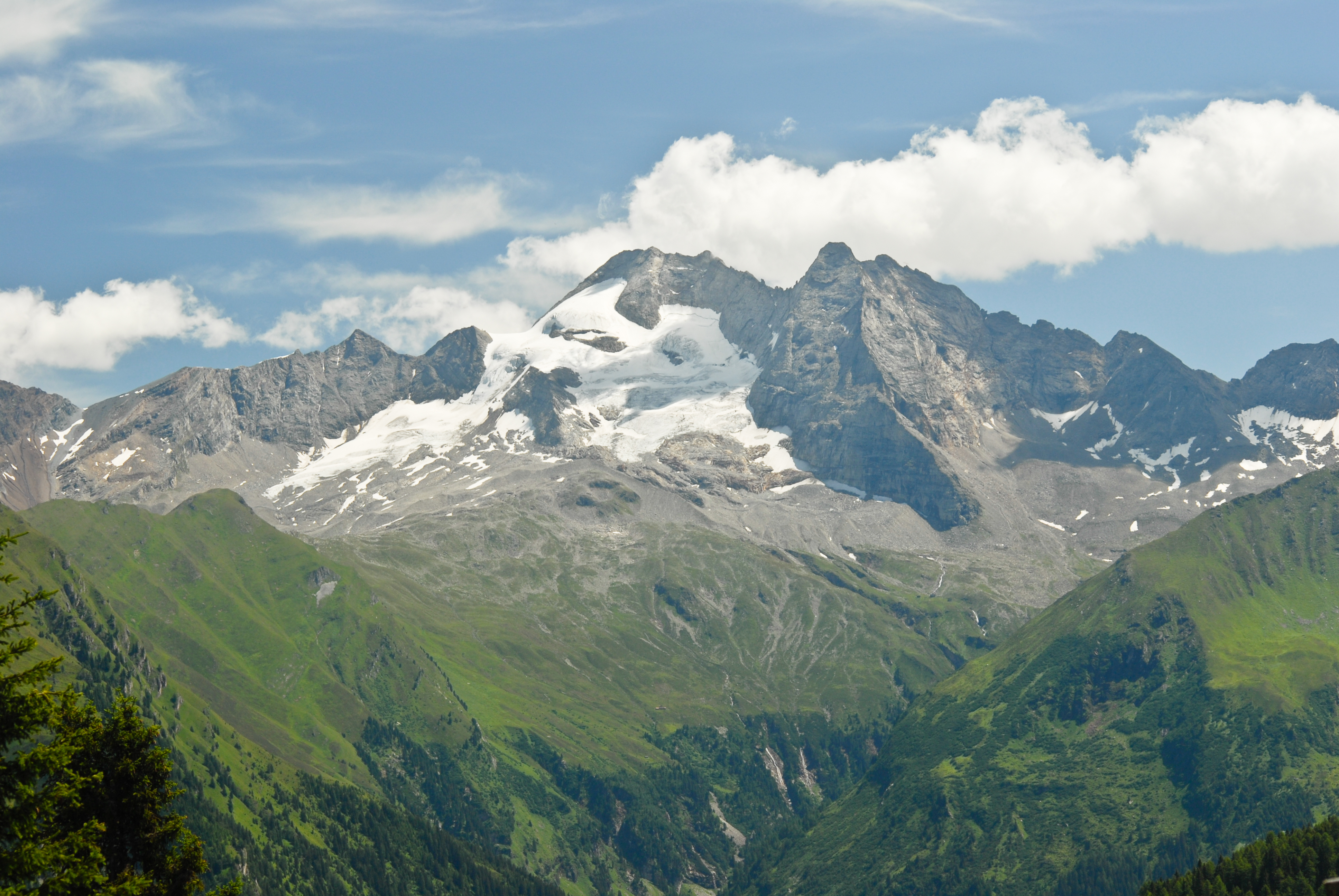 Olperer and Fußstein from west, Padauner Kogel